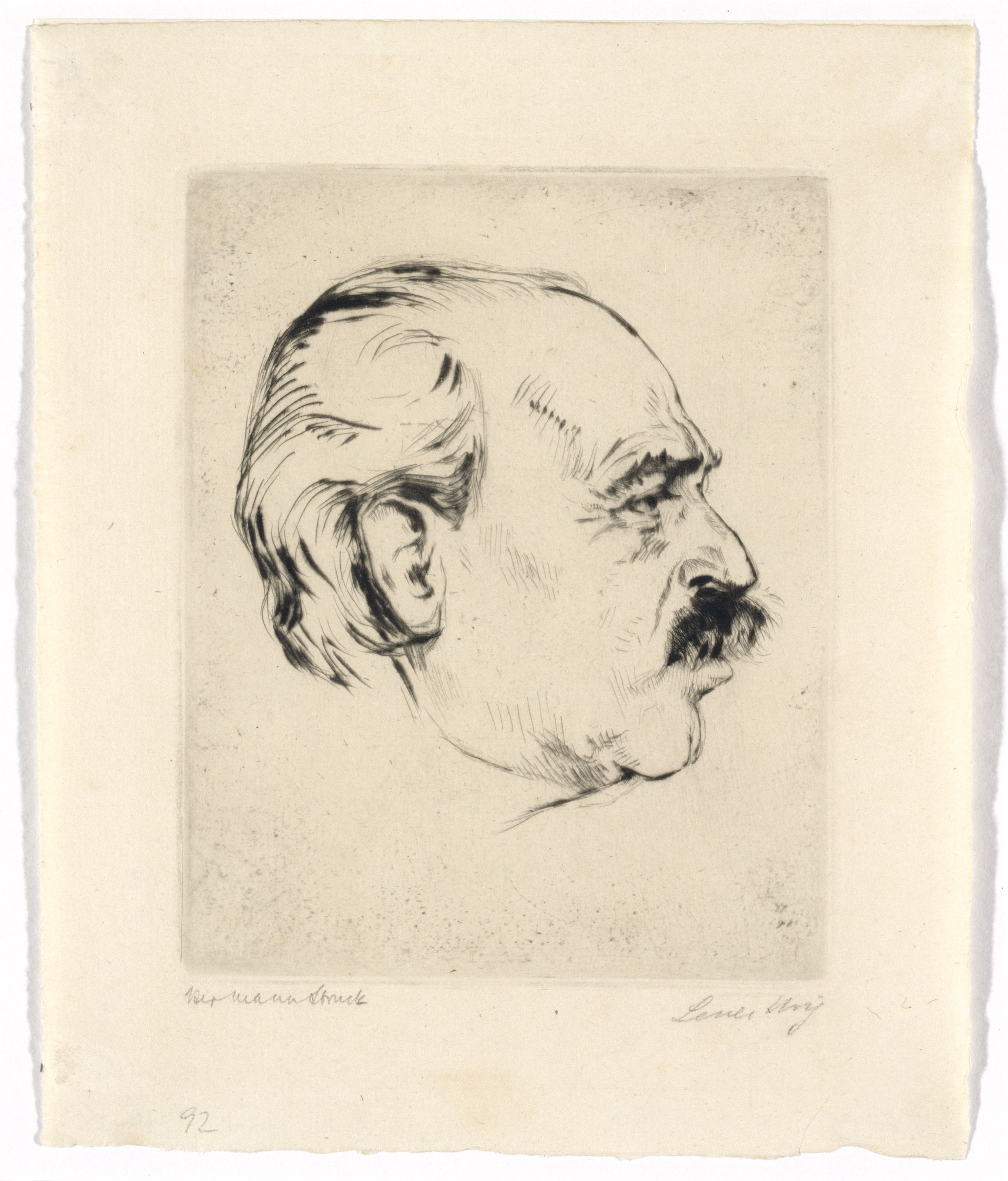 Artwork by Hermann Struck Dargestellte Person: Ury, Lesser (7.11.1861 - 18.10.1931), DNB-Link Datierung Display: ca. 1923 Objektart: Radierung Schlagworte Inhalt /Geografie: Mann, Porträt Schlagworte Kontext: Maler